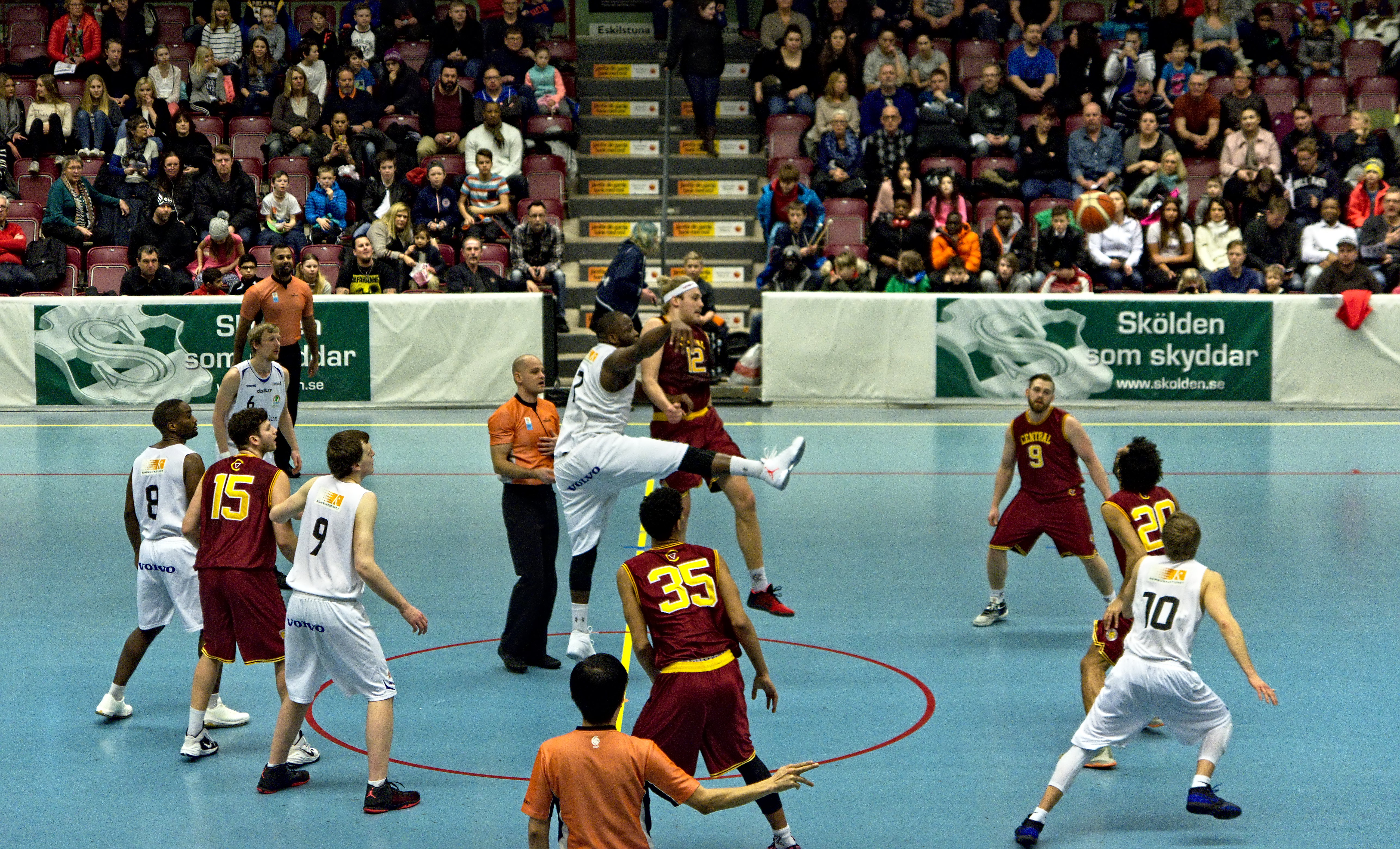 Eskilstuna Basket-KFUM Central, 2016-03-05 i Eskilstuna sporthall. Match i Basketettans fortsättningsserie Superettan.